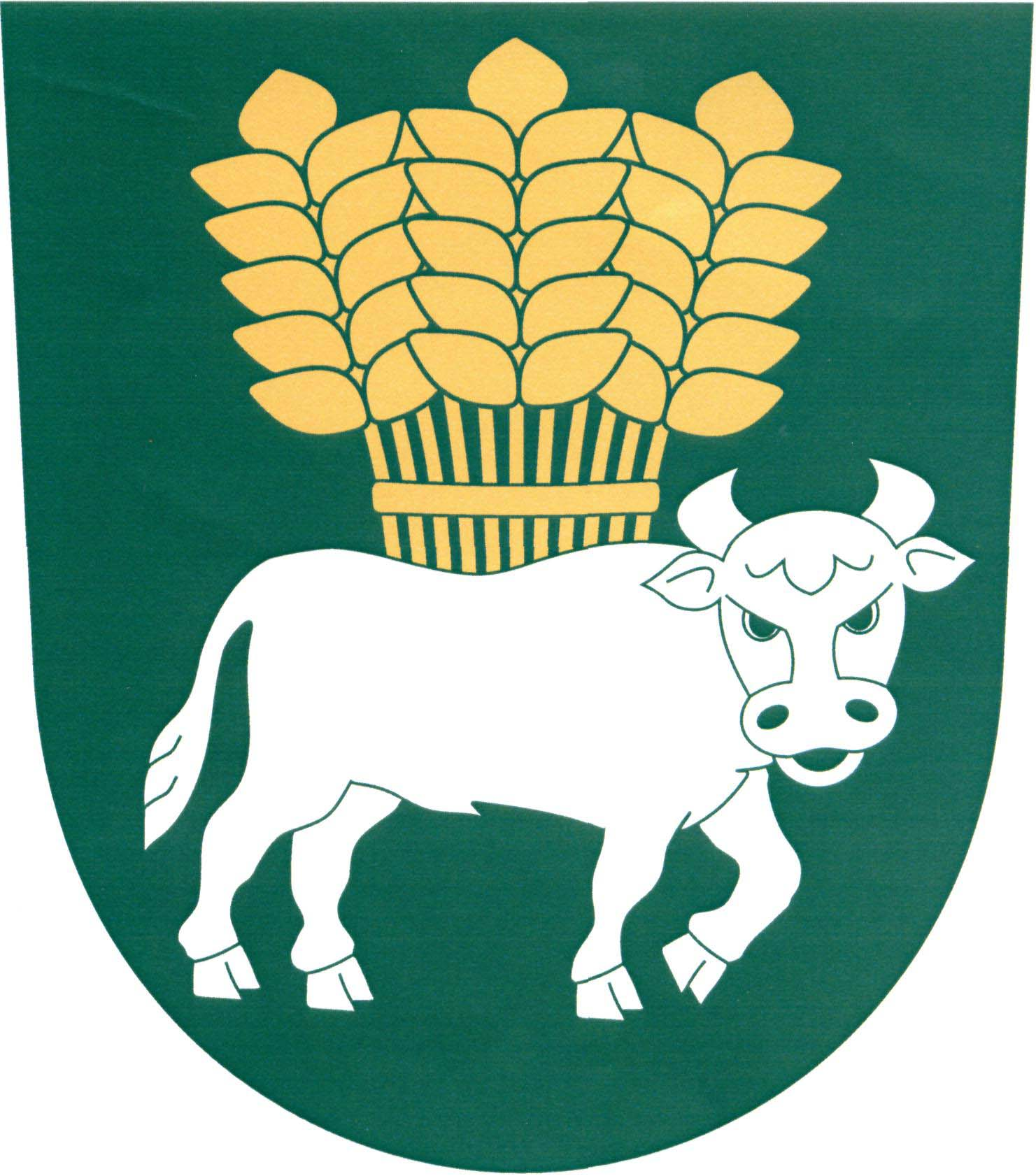 Znak obce Suchá (okres Jihlava)